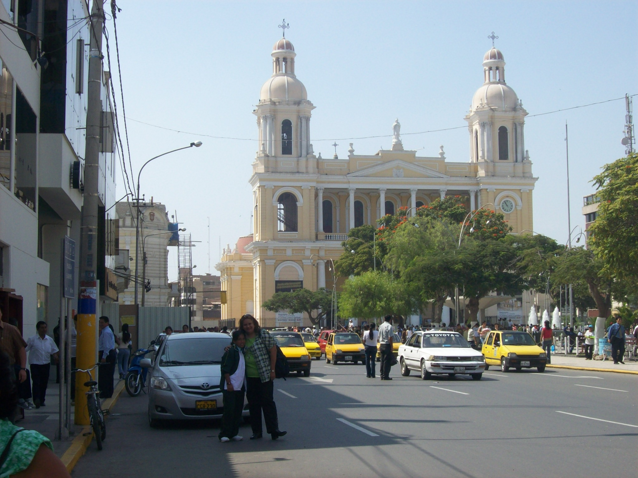 Chiclayo Perú